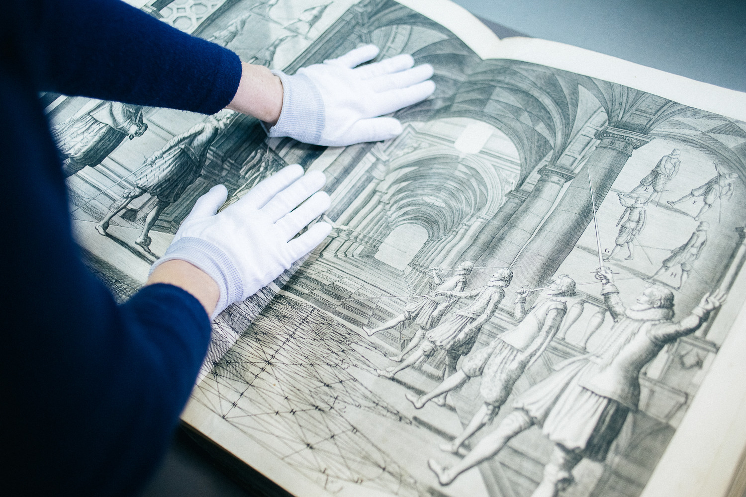 Государственное бюджетное учреждение культуры г. Москвы «Центральная универсальная научная библиотека имени Н.А. Некрасова» Главное здание Библиотеки им. Н.А. Некрасова 105005, Москва, ул. Бауманская, д. 58/25, стр. 14 (м. «Бауманская»)